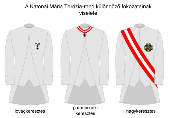 A Katonai Mária Terézia-rend viselési módja